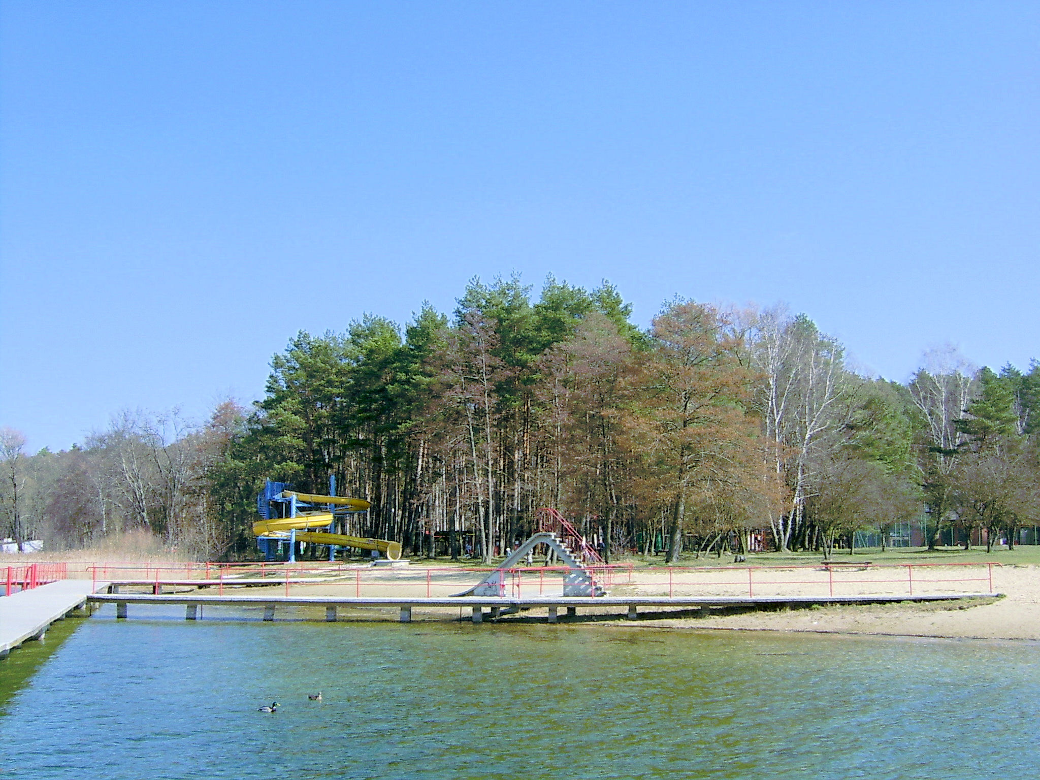 Jezioro Głębokie pod Międzyrzeczem (lubuskie) wczesną wiosną.